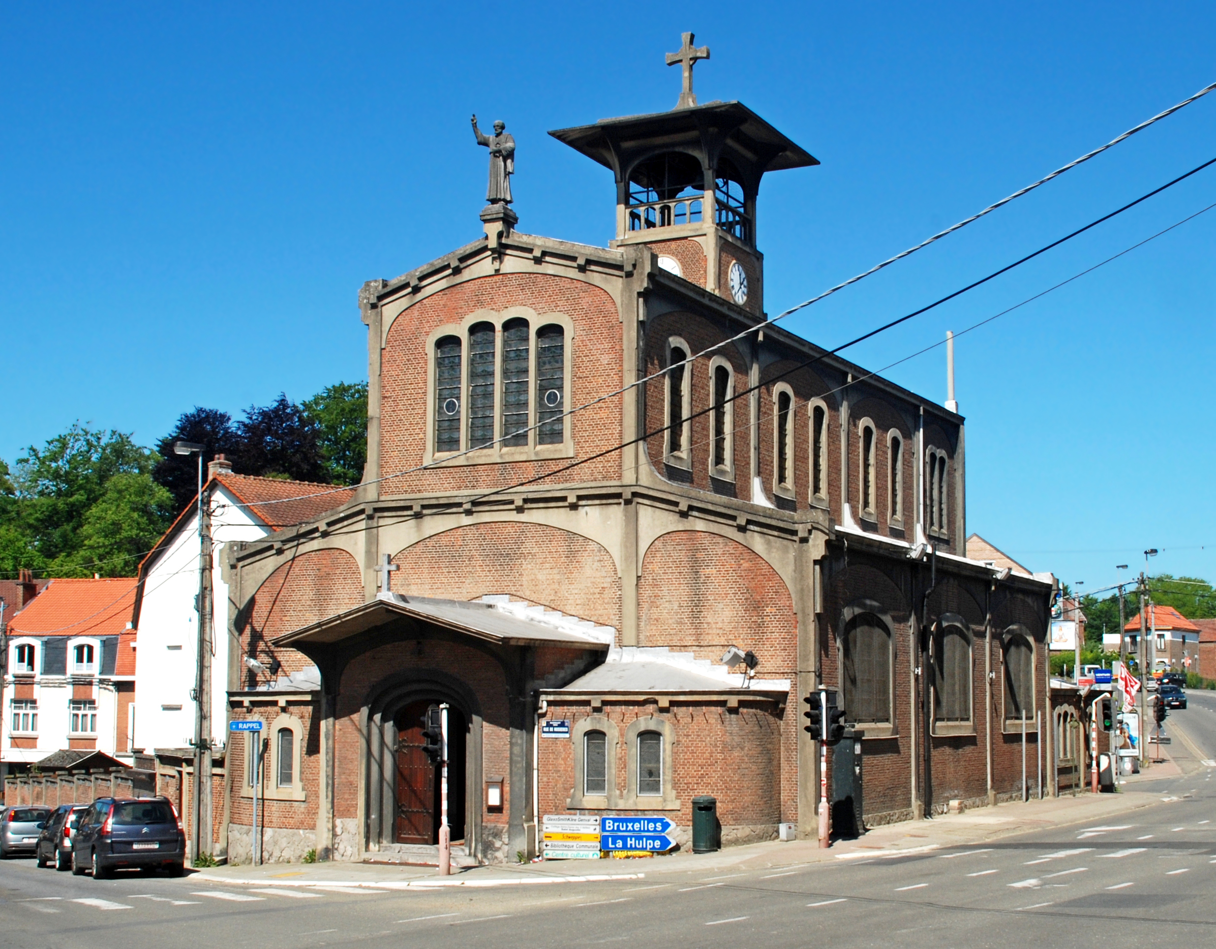 Belgique - Brabant wallon - Rixensart - Genval - Église Saint-Pierre de Maubroux